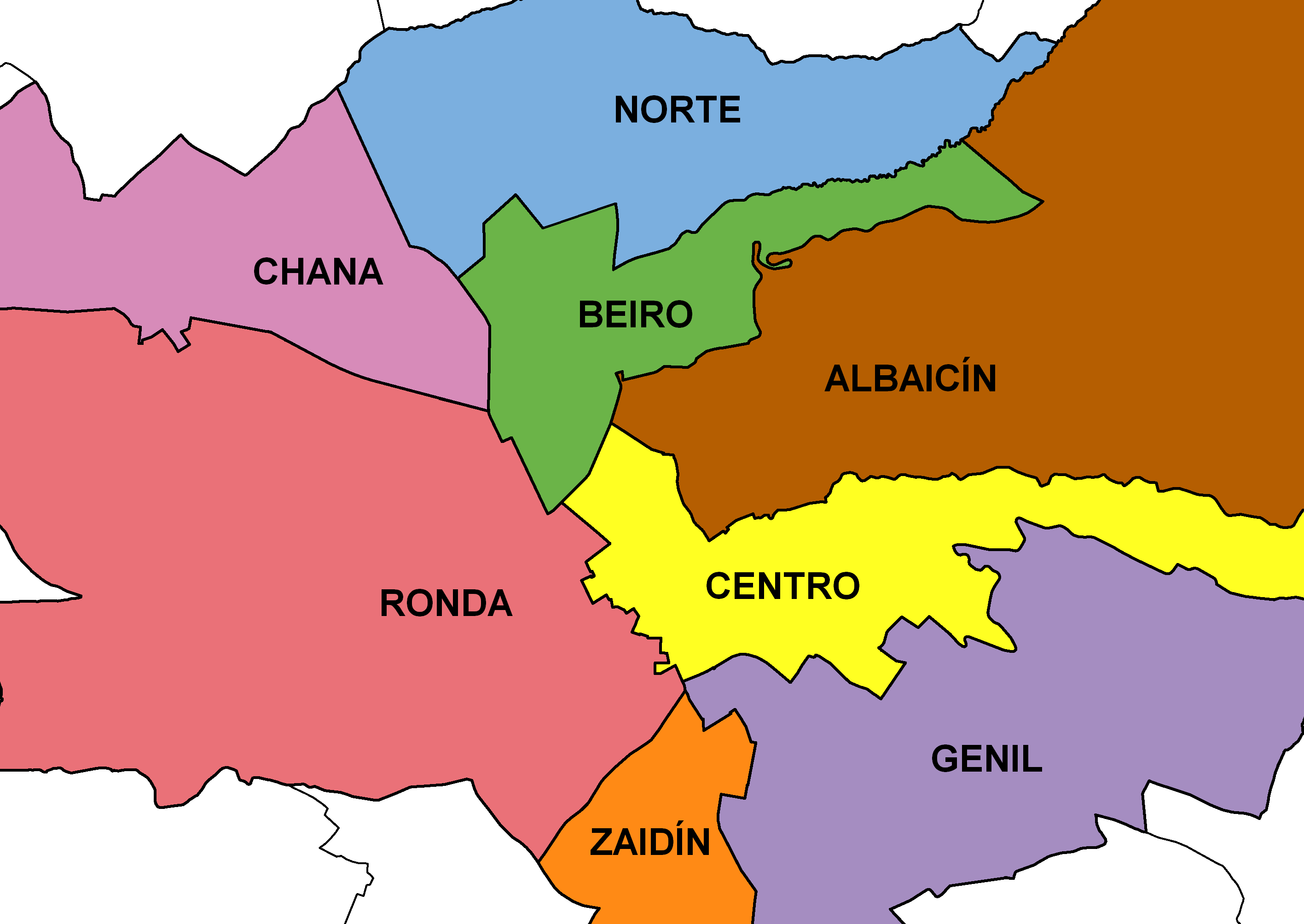 Distritos de la ciudad de Granada (Granada, España)